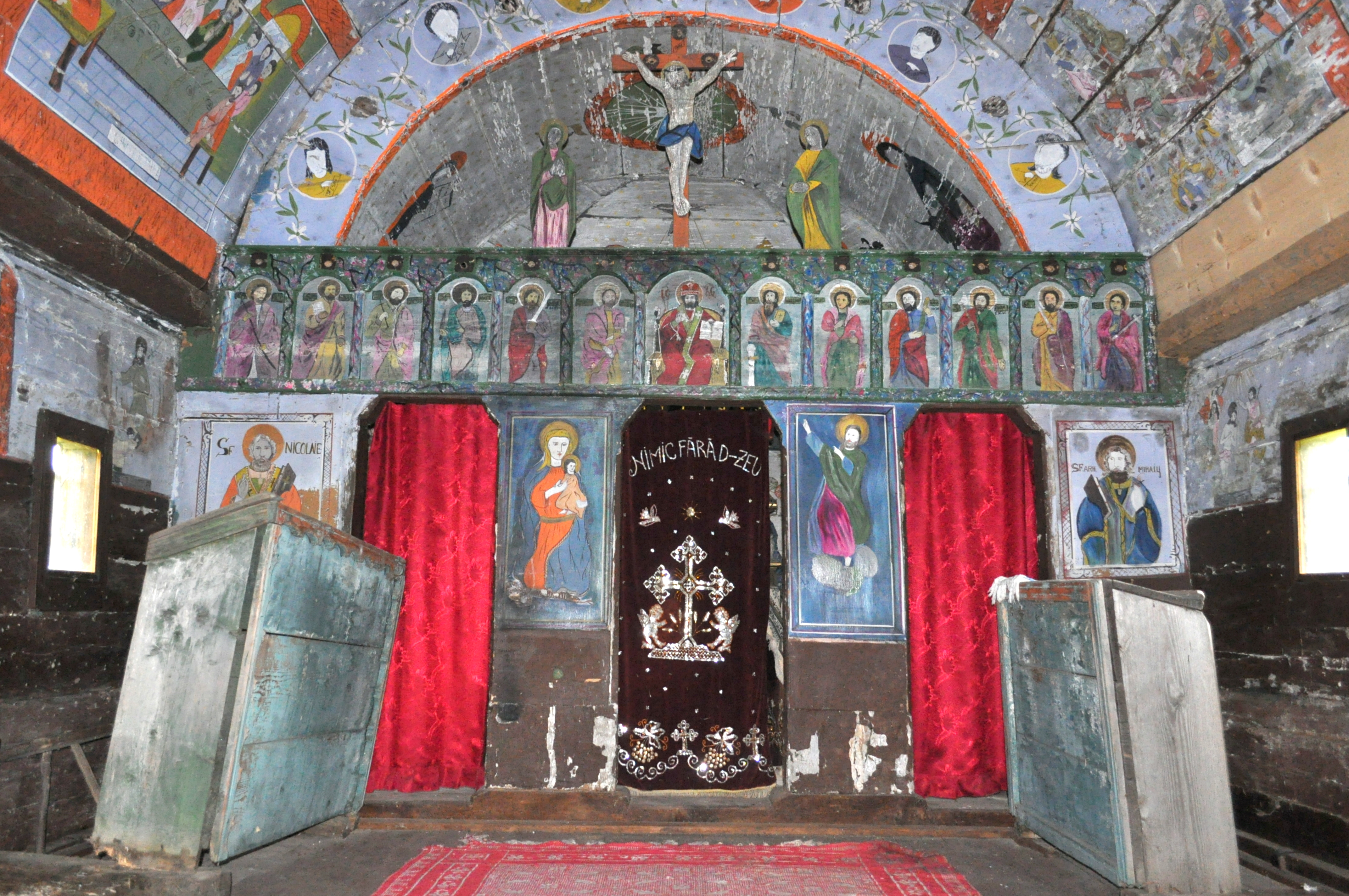 Biserica de lemn din Toplița, comuna Letca, judeţul Sălaj